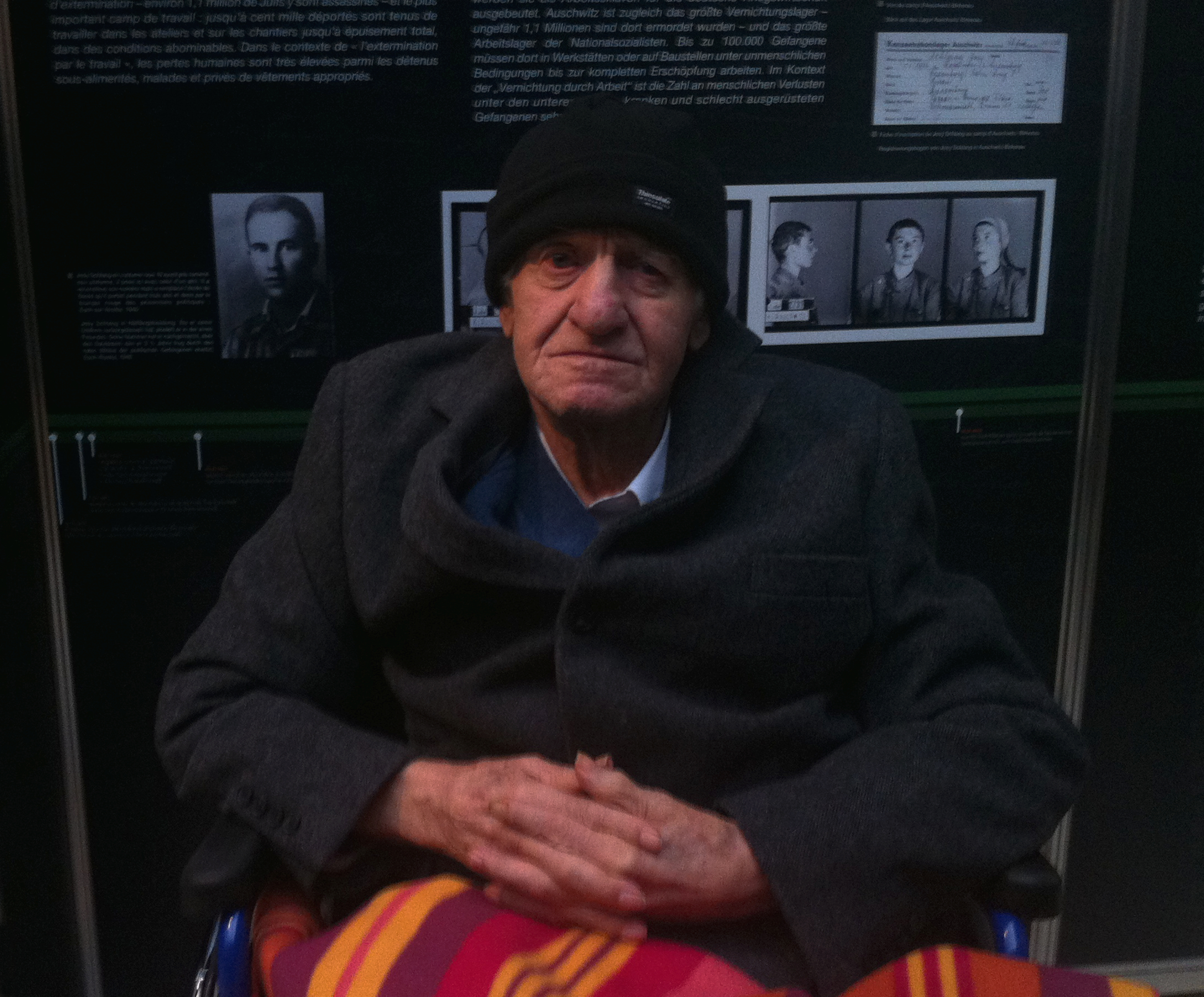 De Josy Schlang, fotograféiert am Nationale Resistenzmusée, de 6. November 2013 .